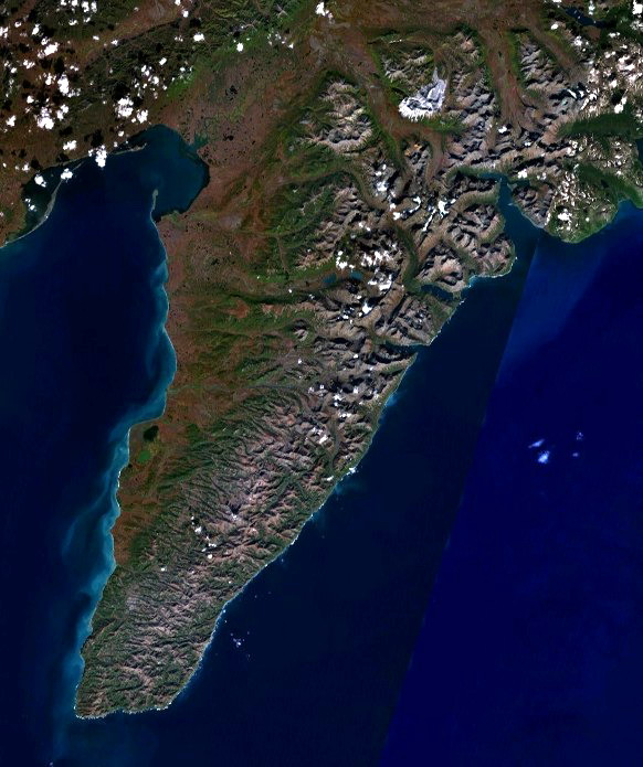 Полуостров Говена.jpg